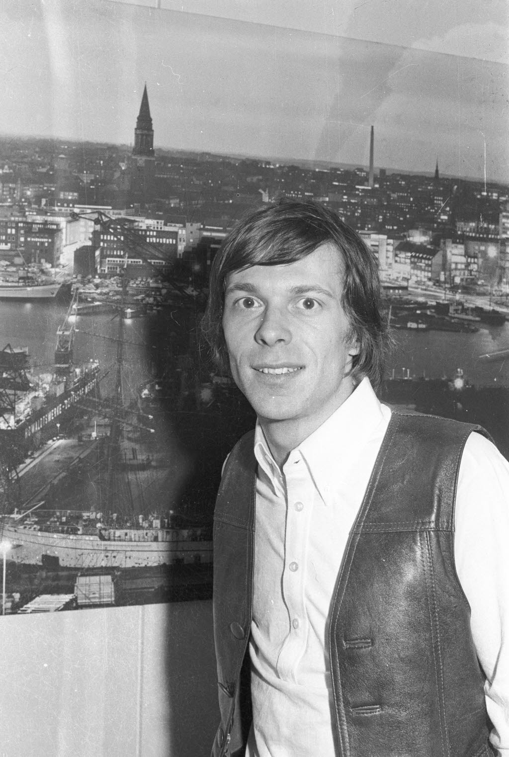 Mey vor seinem Auftritt im Konzertsaal des Schlosses beim Interview mit den Kieler Nachrichten (KN).